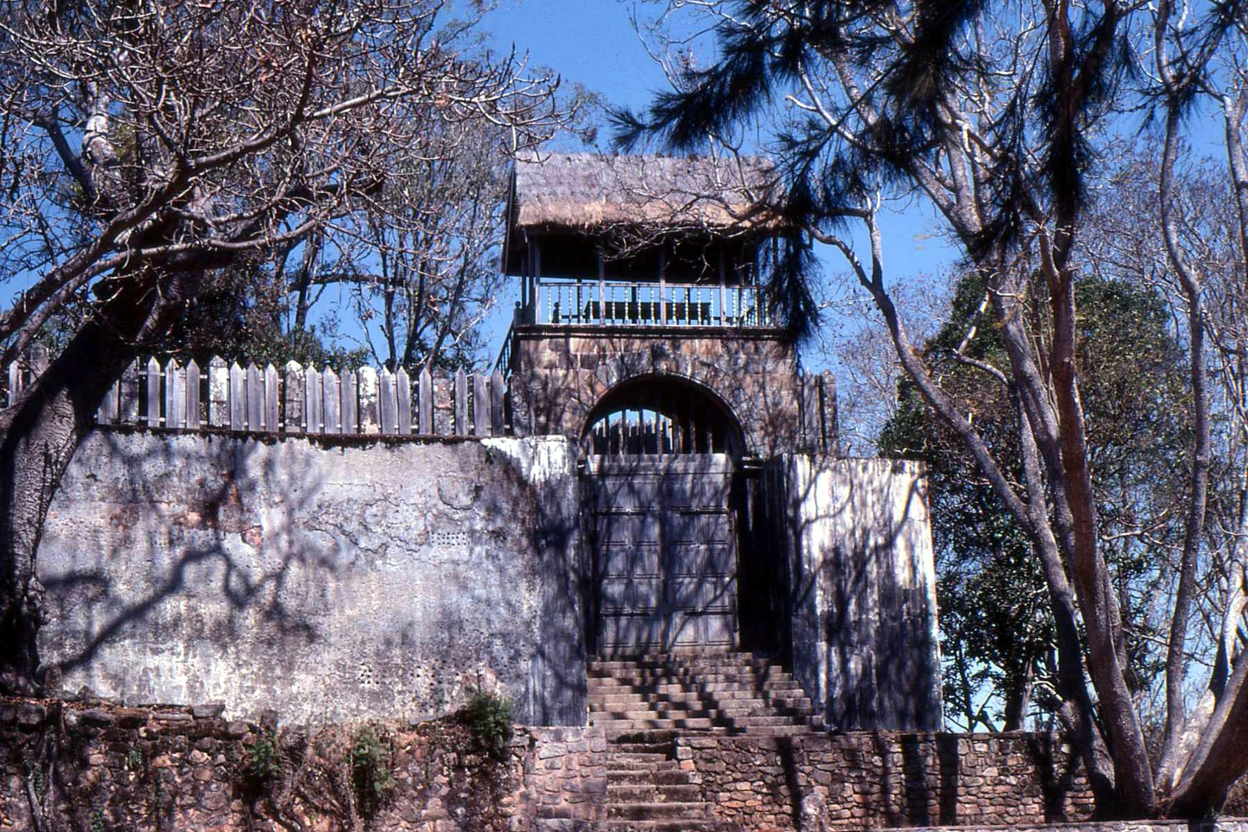 Palais d'été de la Reine Ambohimanga